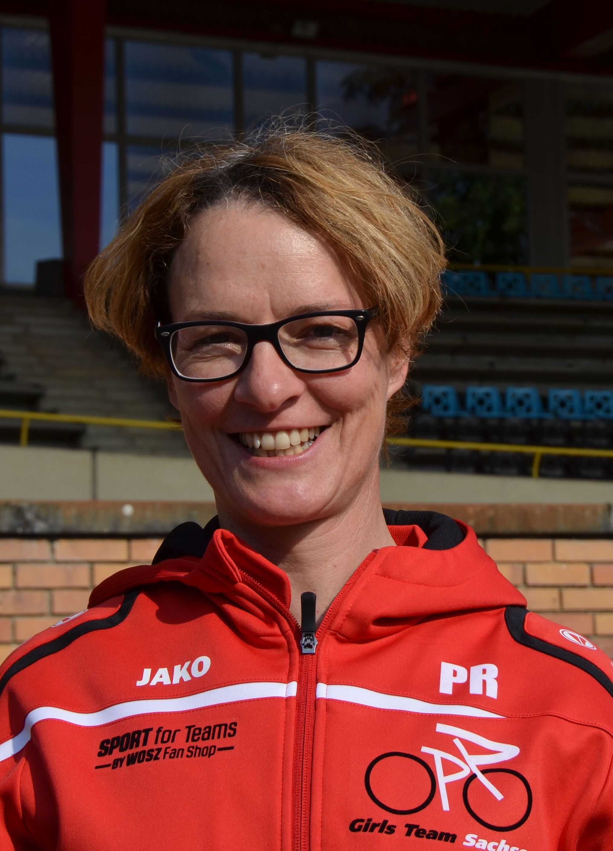 Petra Rossner, deutsche Radsportlerin The making of this document was supported by the Community-Budget of Wikimedia Germany.